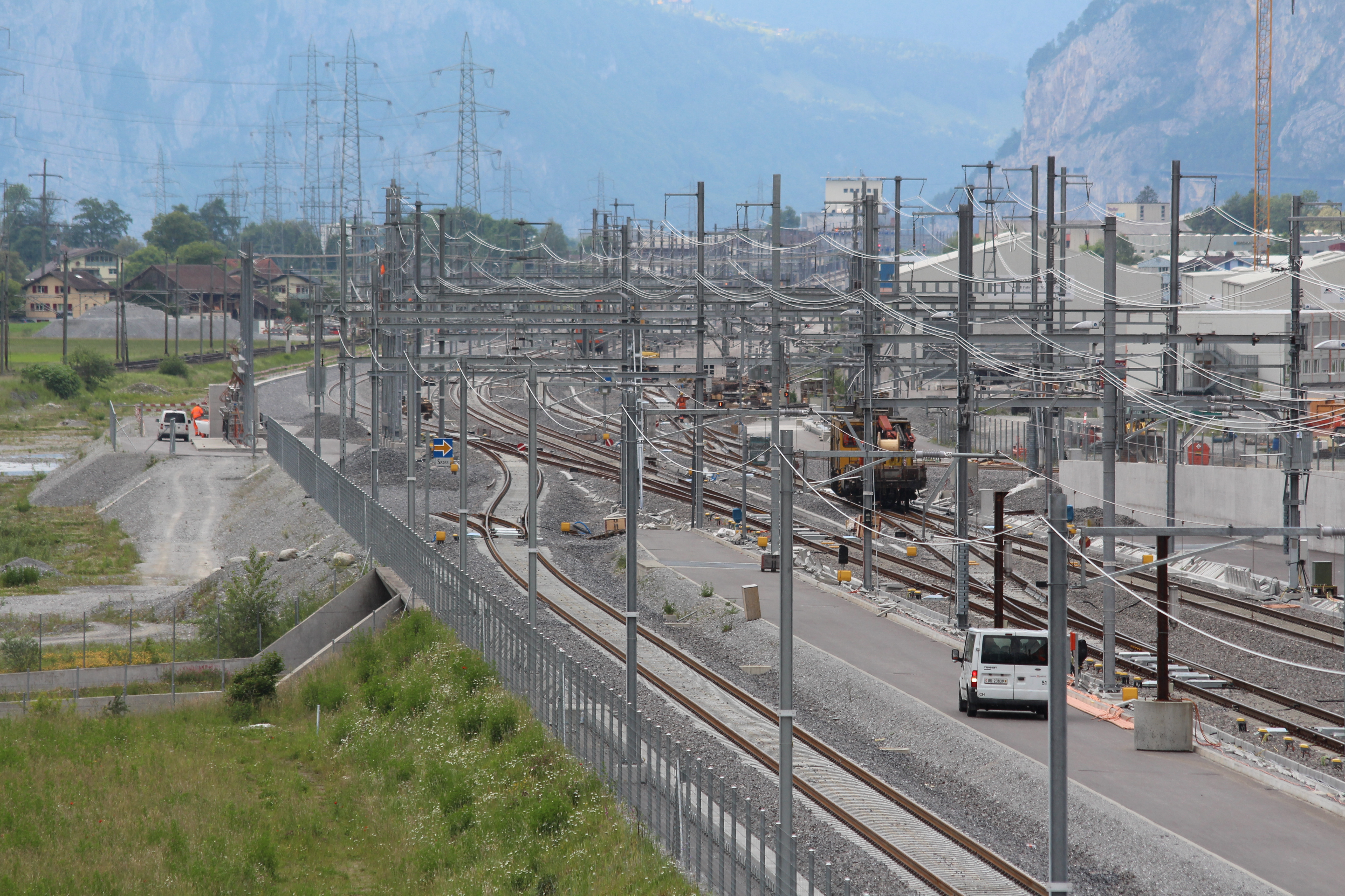 AlpTransit NEAT - Gleisarbeiten - Baustelle Erstfeld UR